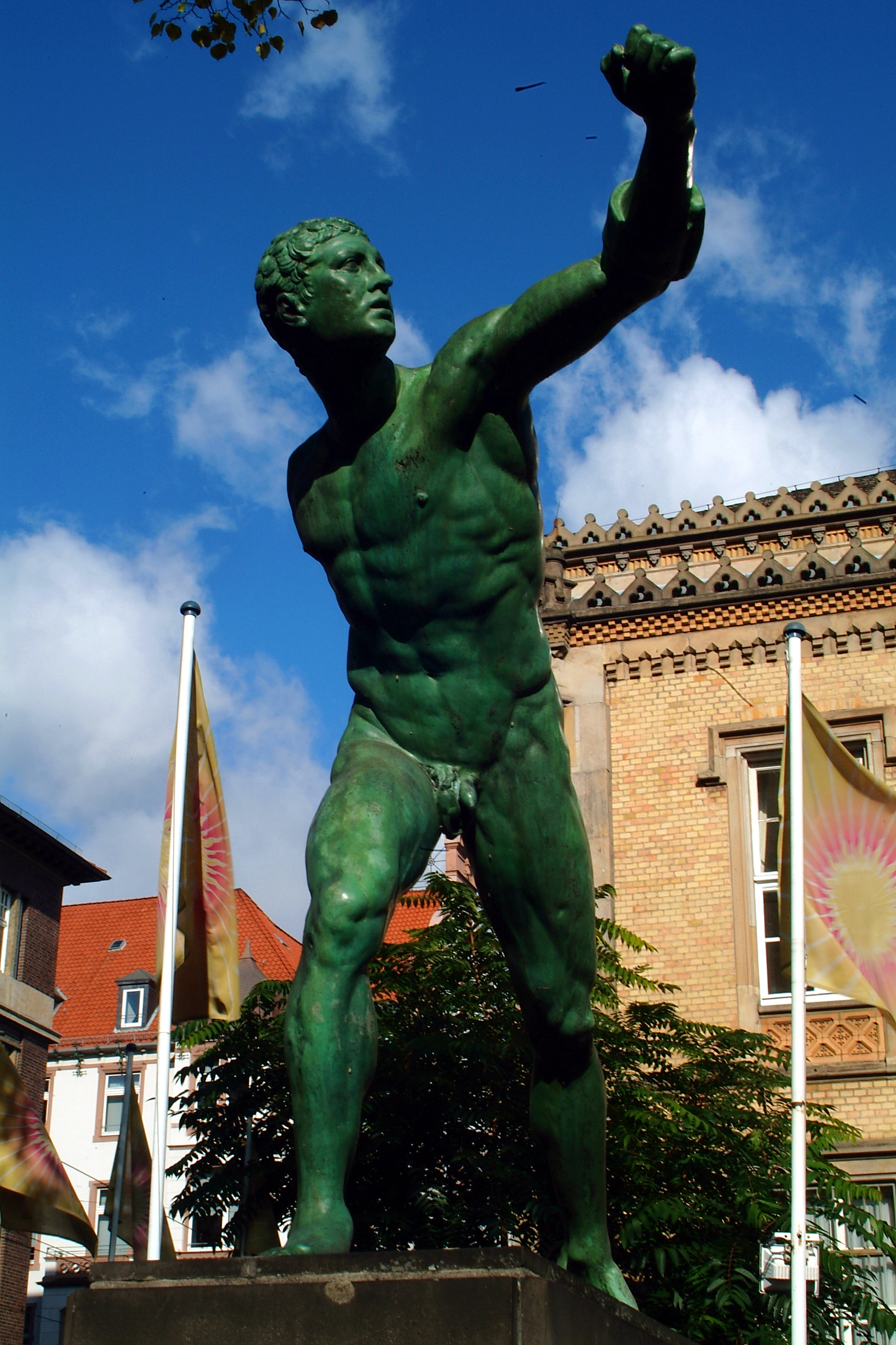 Die Skulptur Borghesische Fechter ist eine Nachbildung von 1918 von einem heute vergessenen Künstler aus München. Sie steht auf der Gartenseite des Palais Grote auf dem Dreieck zwischen Prinzenstraße, Sophienstraße und Schiffgraben.